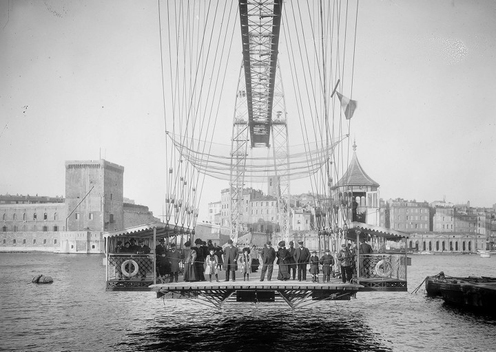 Titre(s) : Pont Transbordeur de Marseille, 1900-1925 Image fixe numérisée / Frères Séeberger, photogr. Publication : St Cyr : Direction du Patrimoine. Service des archives photographiques, 1900-1925 Editeur : France. Direction du patrimoine. Service des archives photographiques Note(s) : Acq. : Archives photographiques (Médiathèque du Patrimoine) (c) Caisse nationale des Monuments historiques Transporteur Bridge, Marseille France Catégorie:Image de Marseille